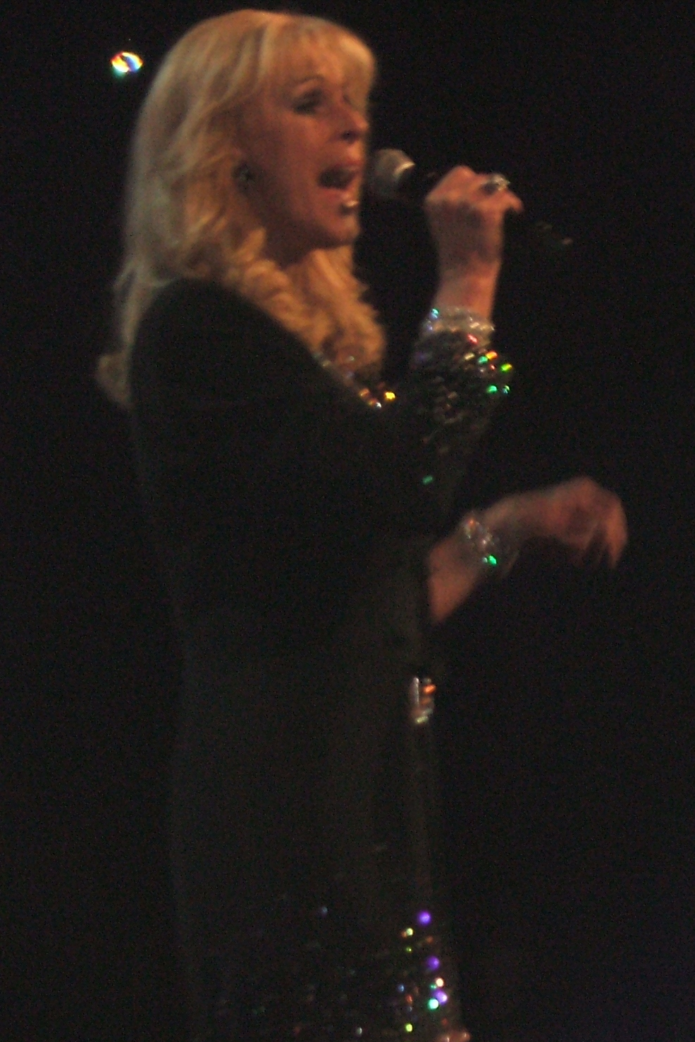 Pauzenummer tijdens het Nationaal Songfestival 2011 Marga Bult